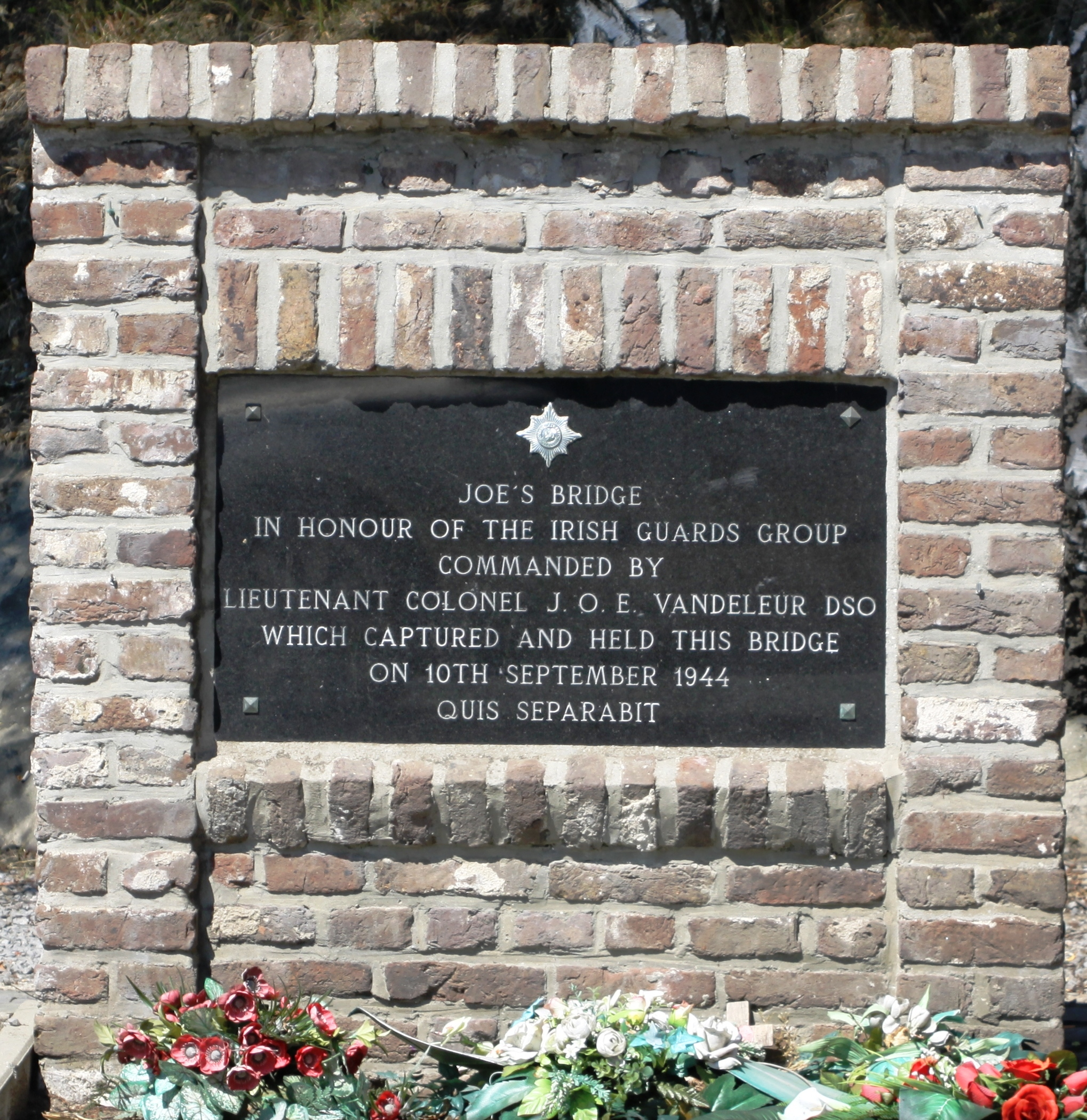 Monument vum Kommandant Vandeleur bei der Joe's Bridge